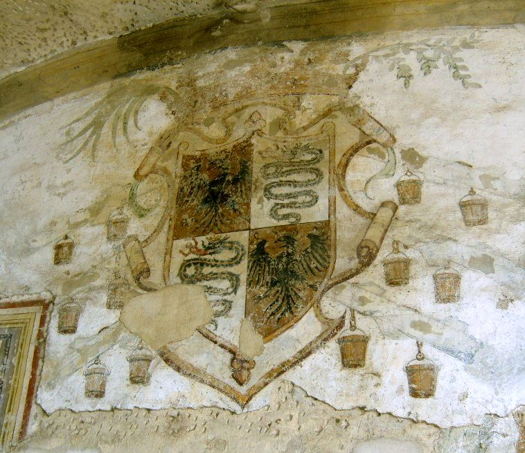 Stemma della famiglia dei Visconti dipinto su un muro del castello di Soncino, in provincia di Cremona.